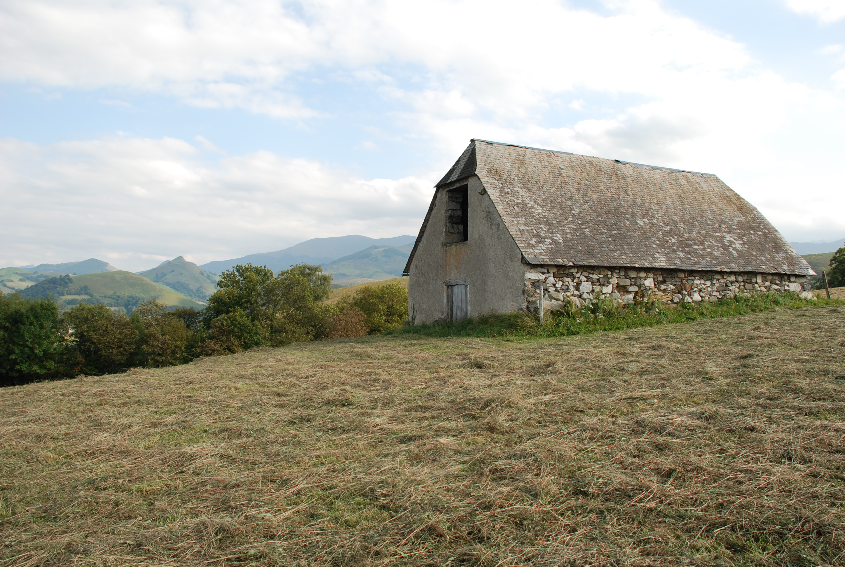 Grange foraine jouxtant l'altisurface d'Artigues (Hautes-Pyrénées). A droite le pic de la Clique dominant Germs sur l'Oussouet